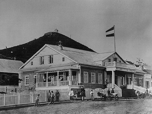 Holzhaus der Handelsfirma Kunst & Albers in Wladiwostok, Russisches Kaiserreich.